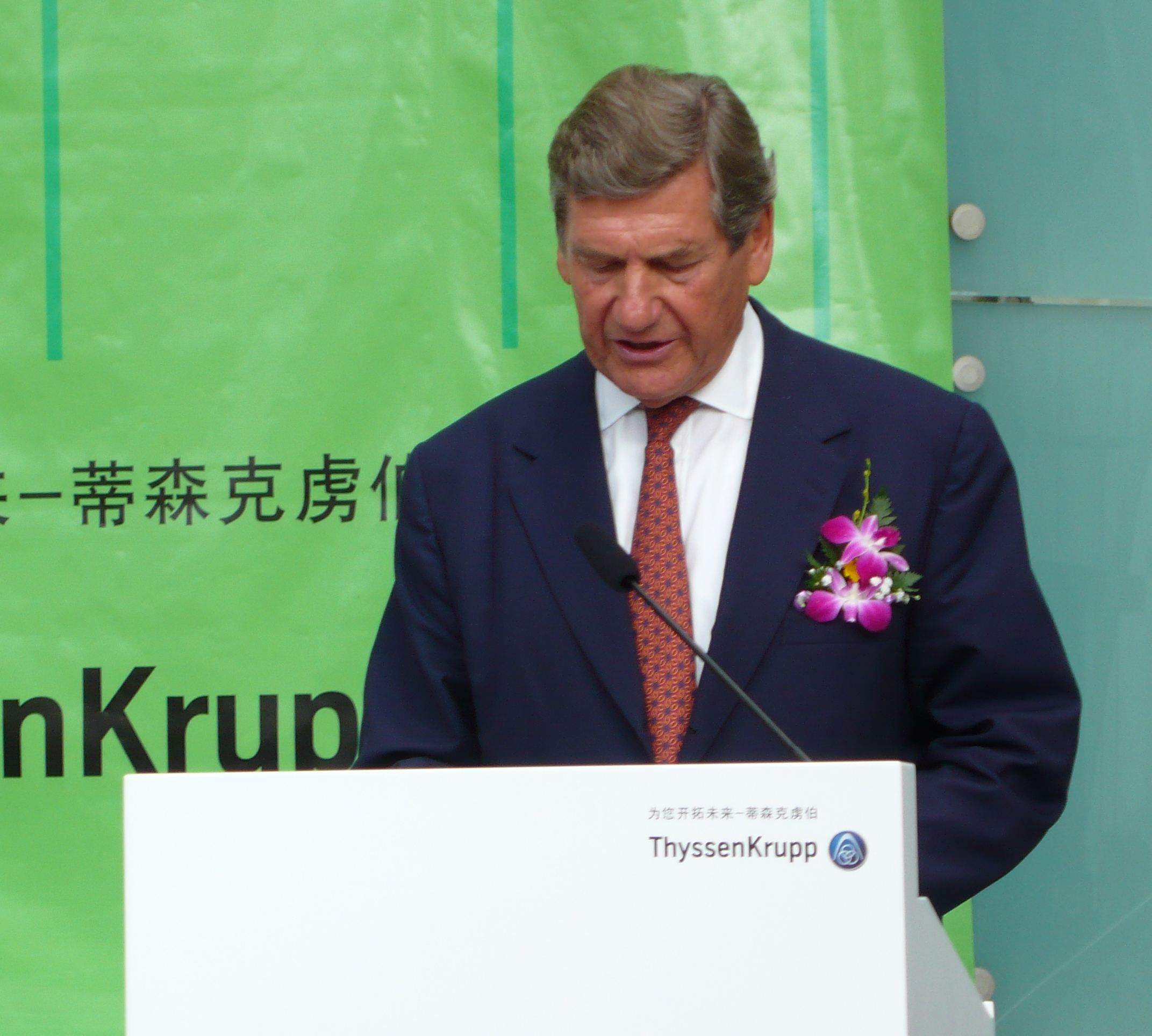 Technology days ThyssenKrupp, Vorsitzender des Vorstands Prof. Dr. Ekkehard Schulz